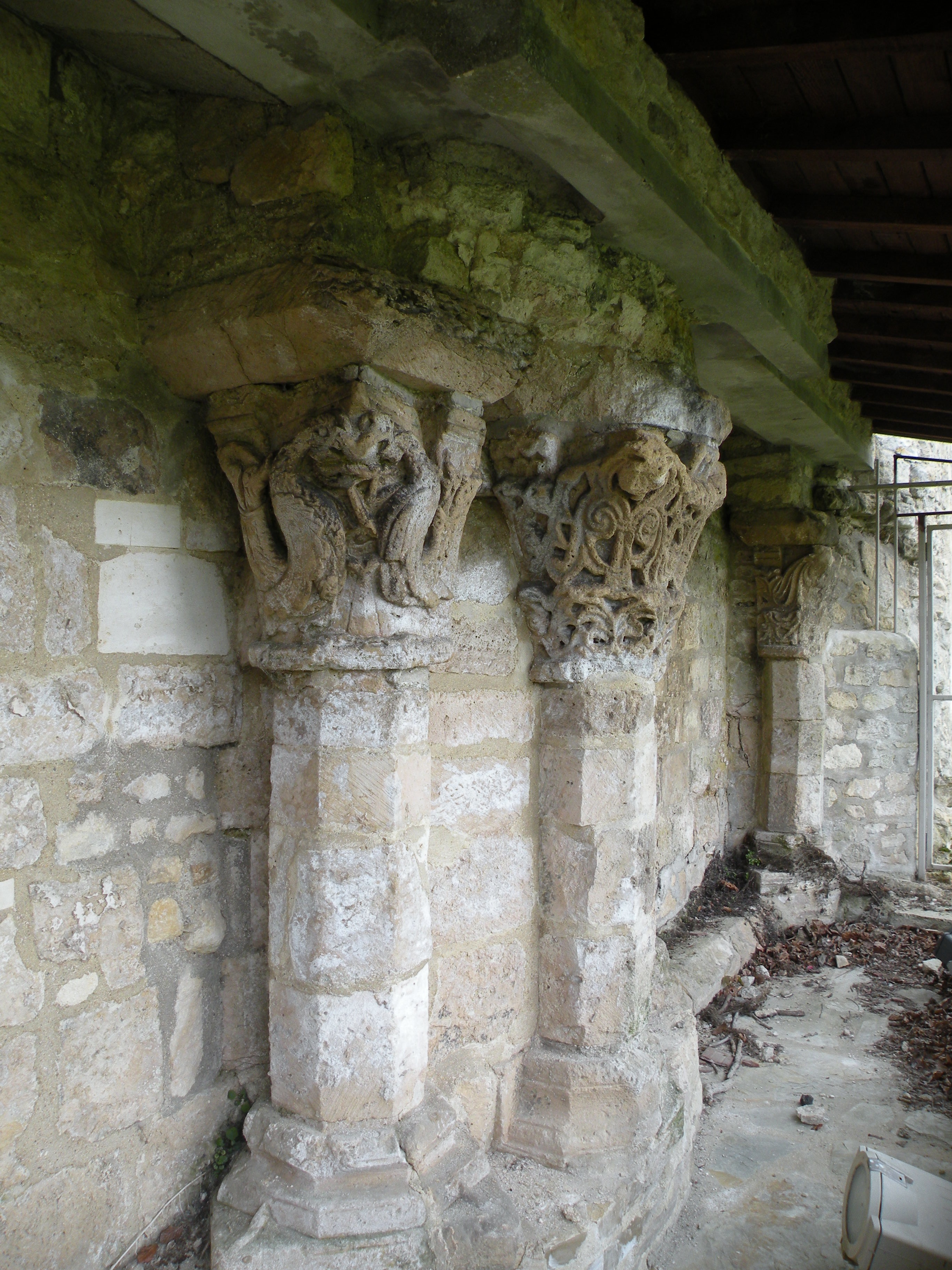 Colonnettes et chapiteaux romans de la crypte de l'ancienne église du prieuré.